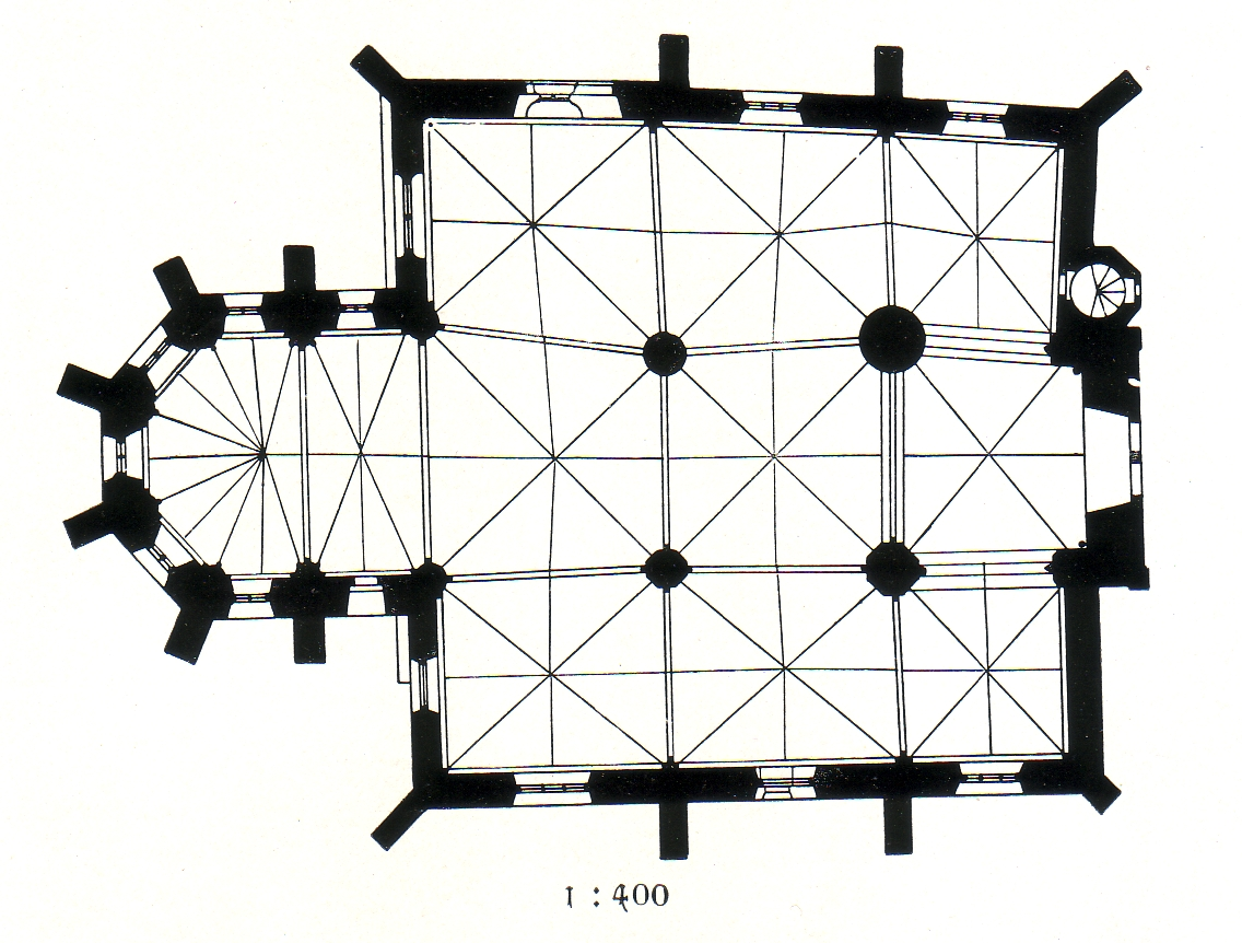 St. Jacobi (Herford)